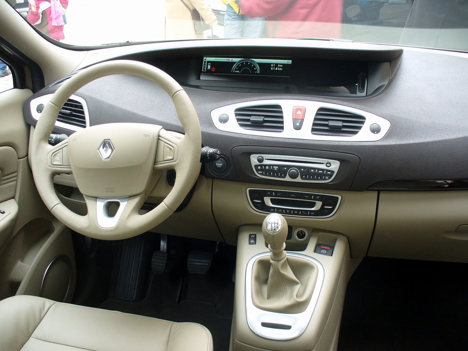 Renault Grand Scénic III